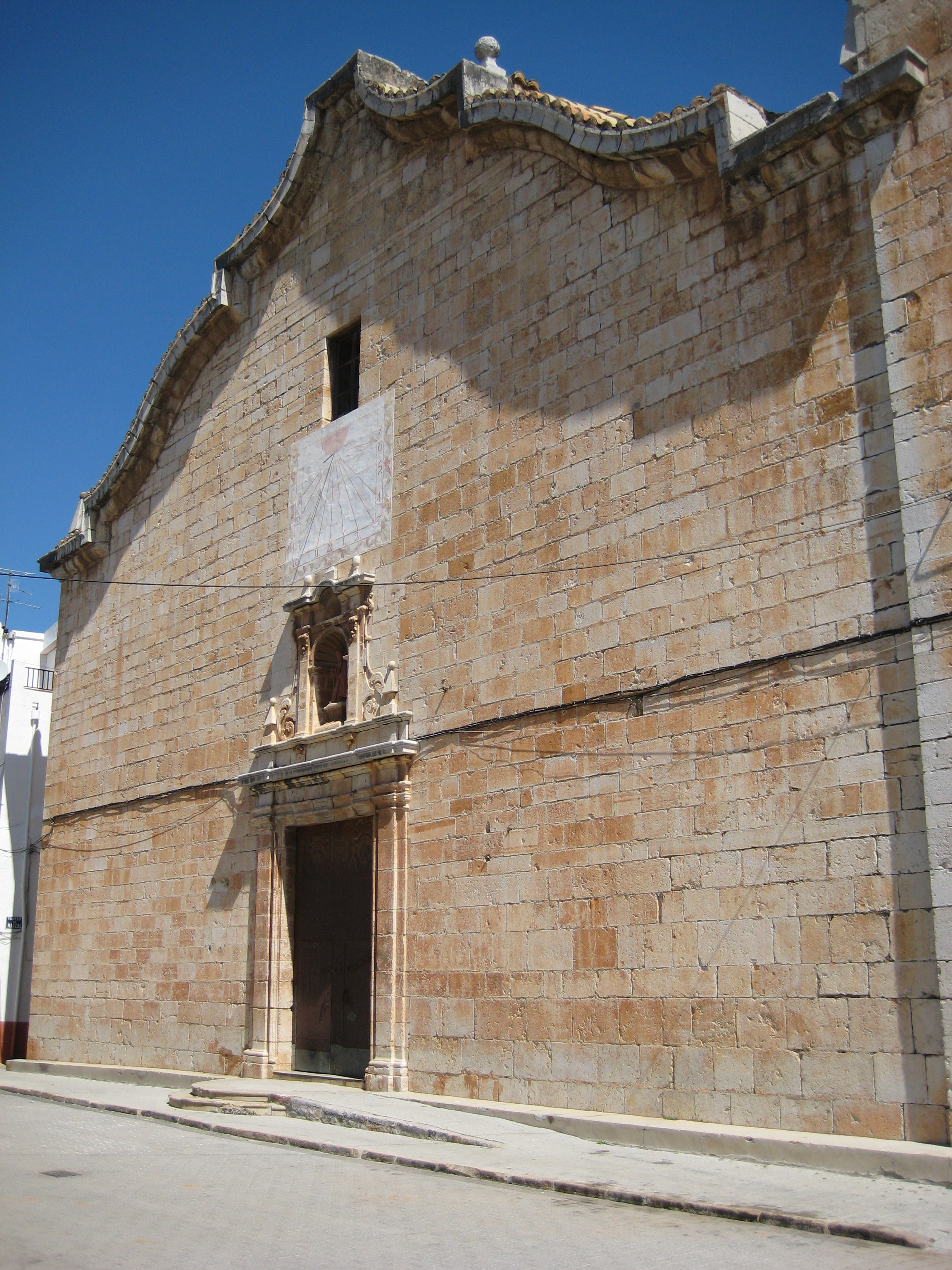 Façana de l'església de l'Assumpció de La Salzadella (Baix Maestrat)